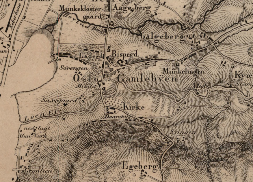 Lithografi utført av Fehr i Christianina